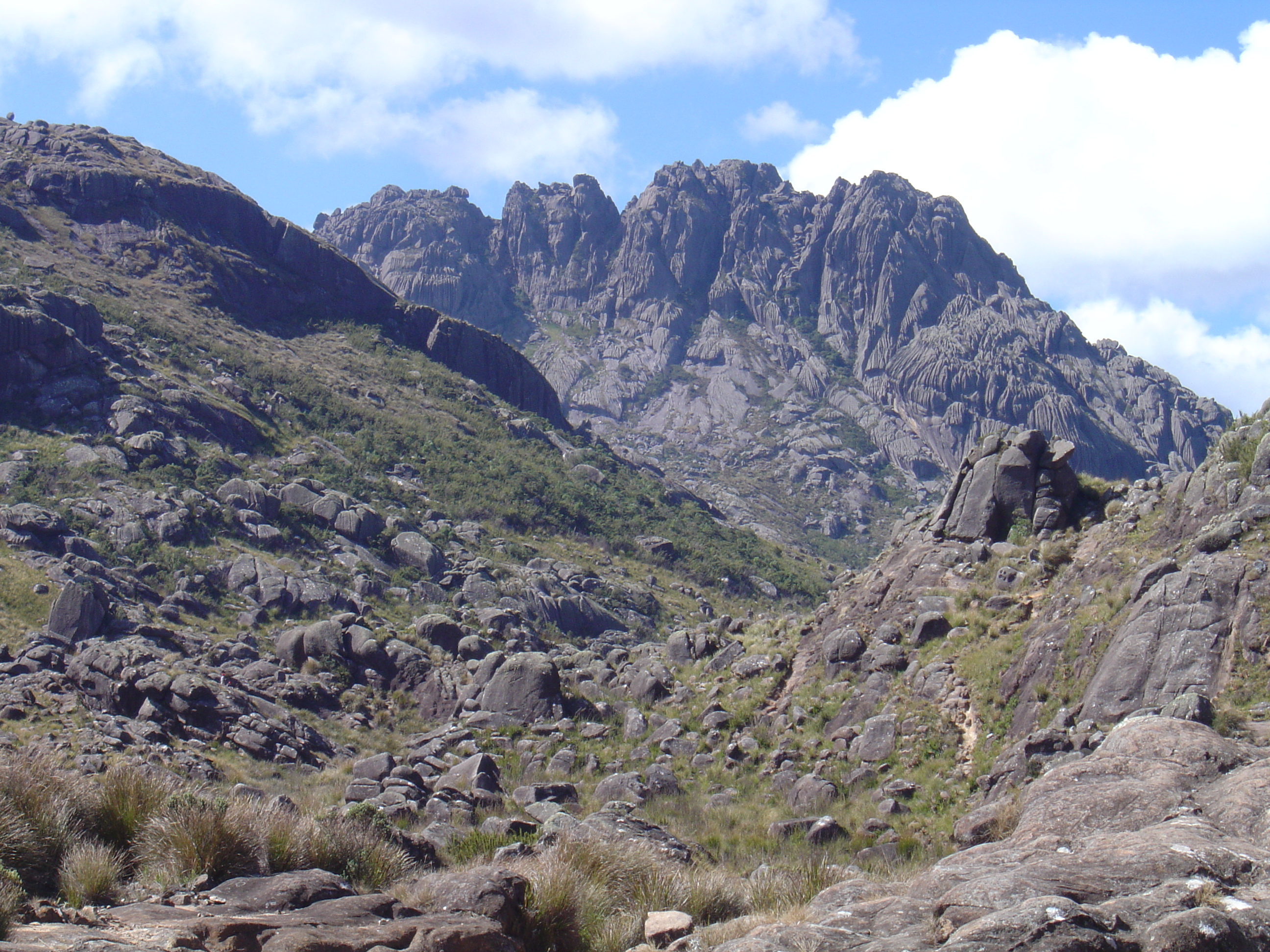 Maciço do Agulhas Negras visto do abrigo rebouças. Serrinha do Alambari.